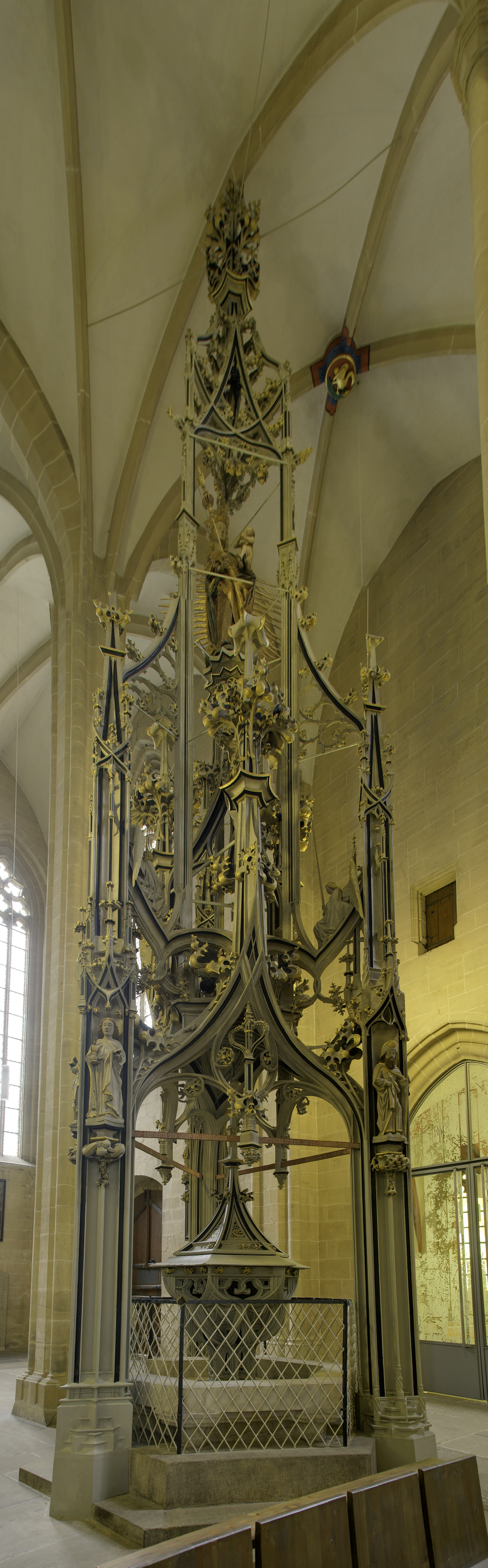 Erfurt Severikirche